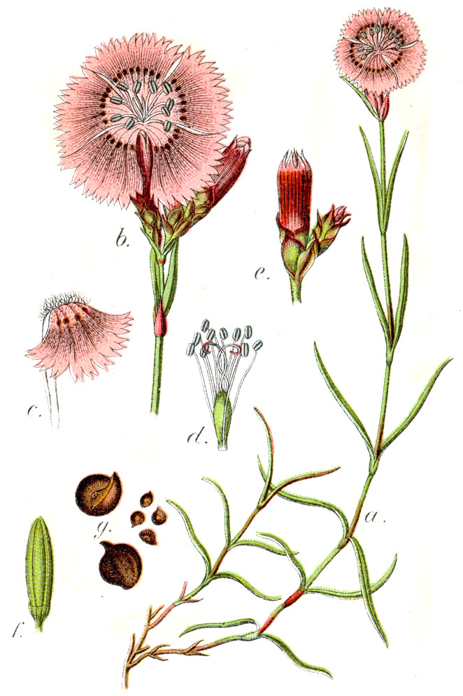 Dianthus seguieri subsp. seguieri, syn. Silene seguieri (Vill.) E.H.L.Krause Original Caption Wald-Nelke, Silene seguierii